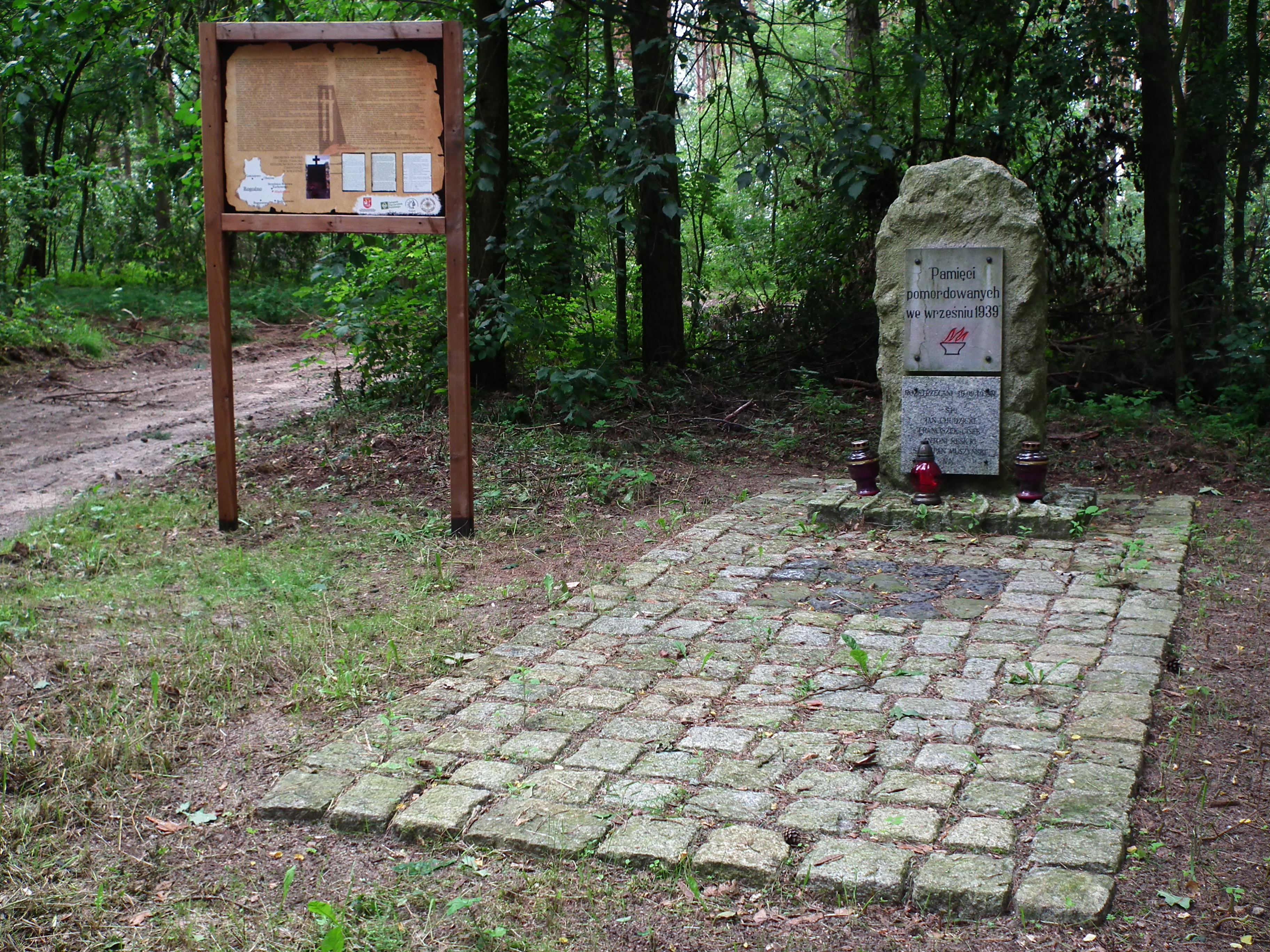 Miejsce pamięci narodowej nad jez. Rogozińskim. Upamiętnia zamorodowanych we wrześniu 1939 przez Selbschutz, Polaków.